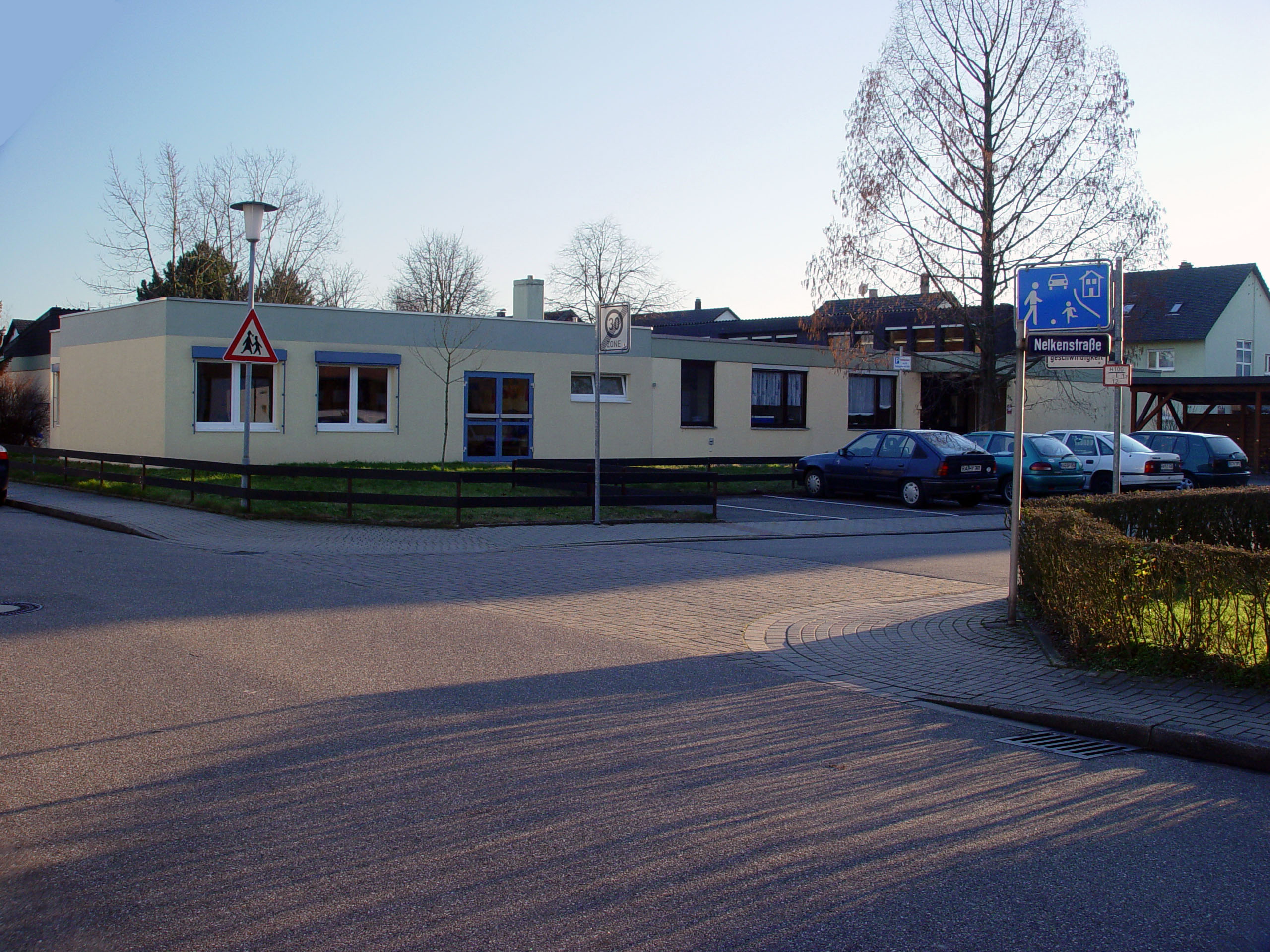 Der katholische Kindergarten St. Michael in Bietigheim.